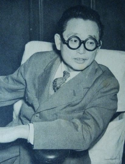 成田文雄（福岡市警察本部長）